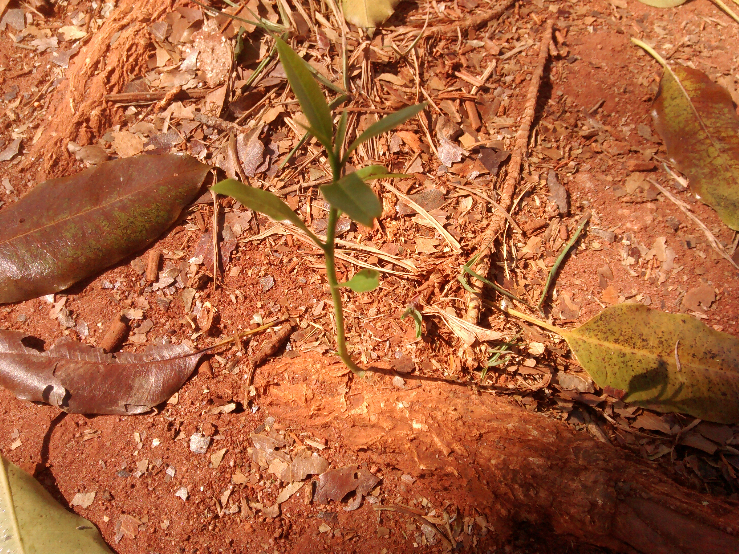 Propagação vegetativa de origem radicular de A. cylindrocaropon.